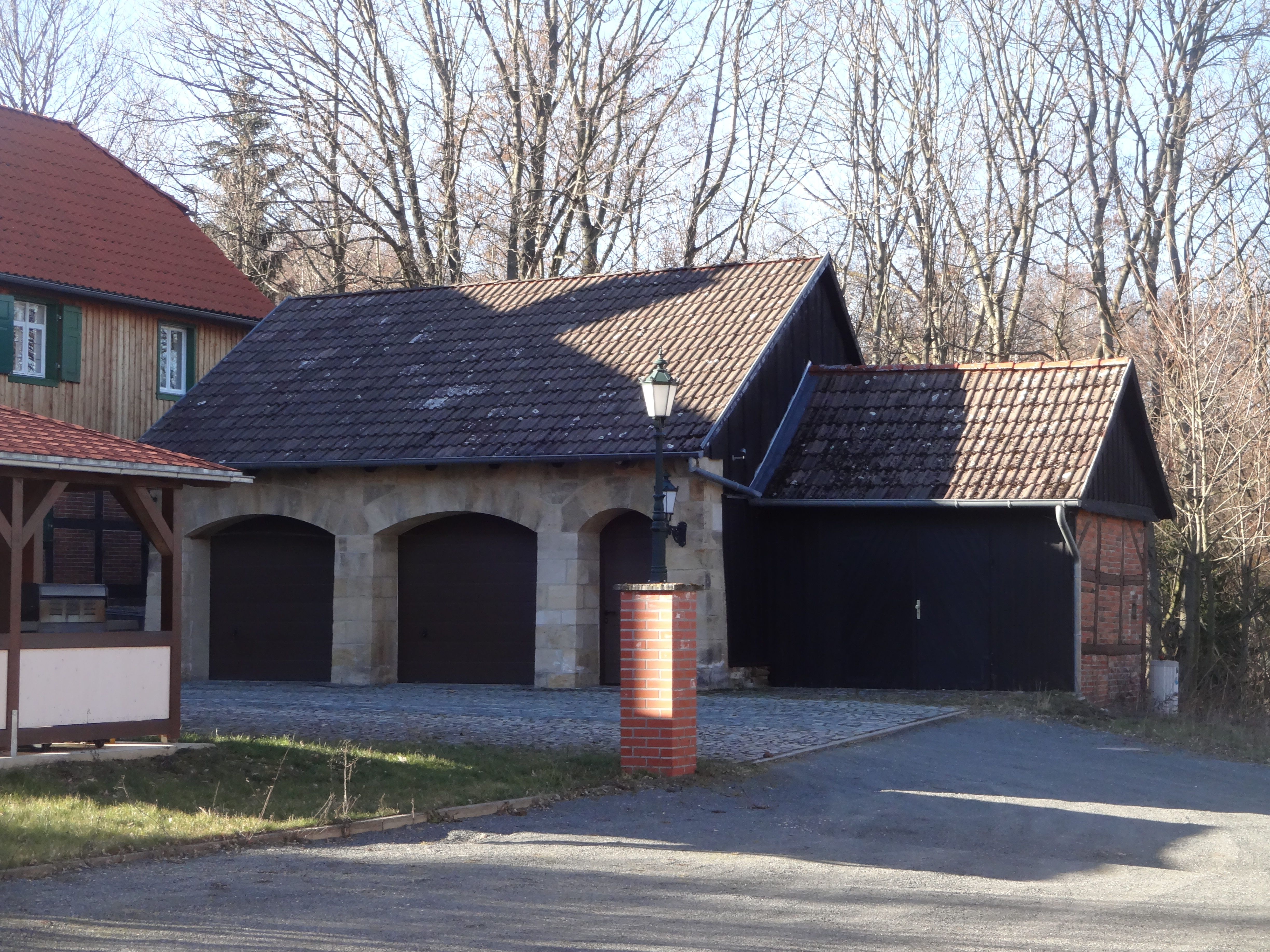 denkmalgeschütztes Jagdzeughaus in der Lindenallee 1 in Darlingerode